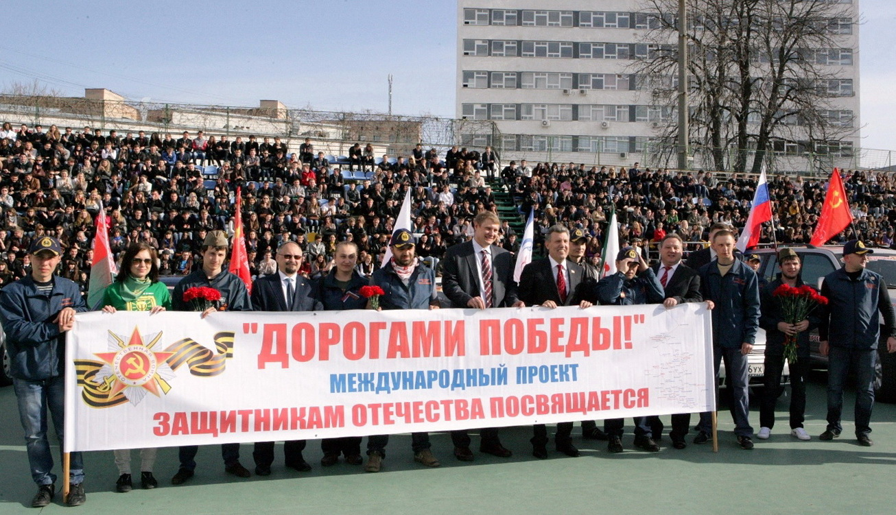 Международный проект "Дорогами Победы" прибыл в Одессу